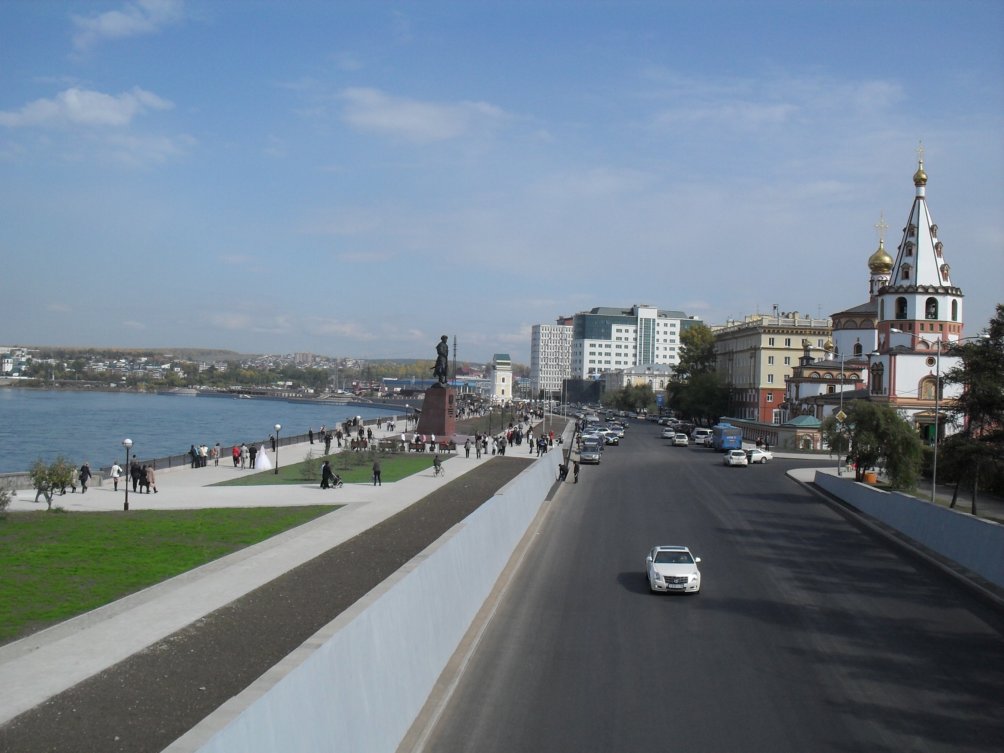 Иркутск. Иркутск. Нижняя Набережная.